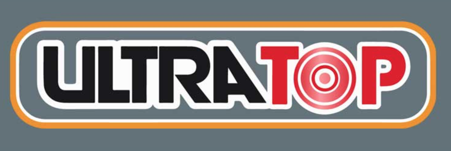 logo ultratop